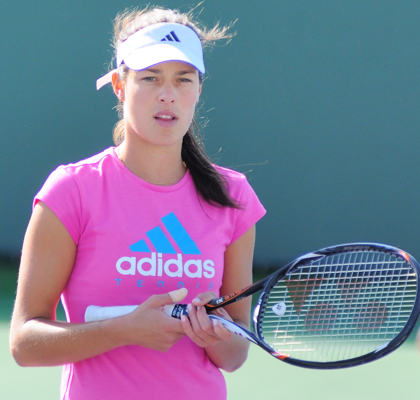 BNP Paribas Open 2012